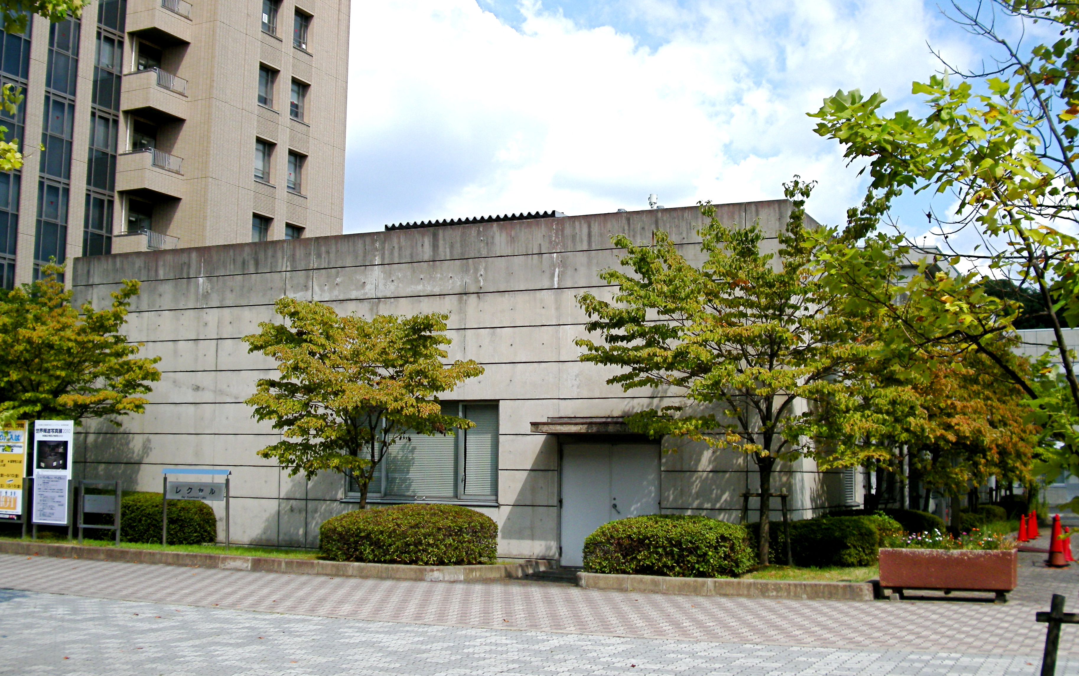 REXL (Biwako Kusatsu Campus, Ritsumeikan University, Japan)